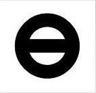 Mirliton du métro : signal disposé à intervalles réguliers dans les zones à visibilité réduite des voies du métro parisien.